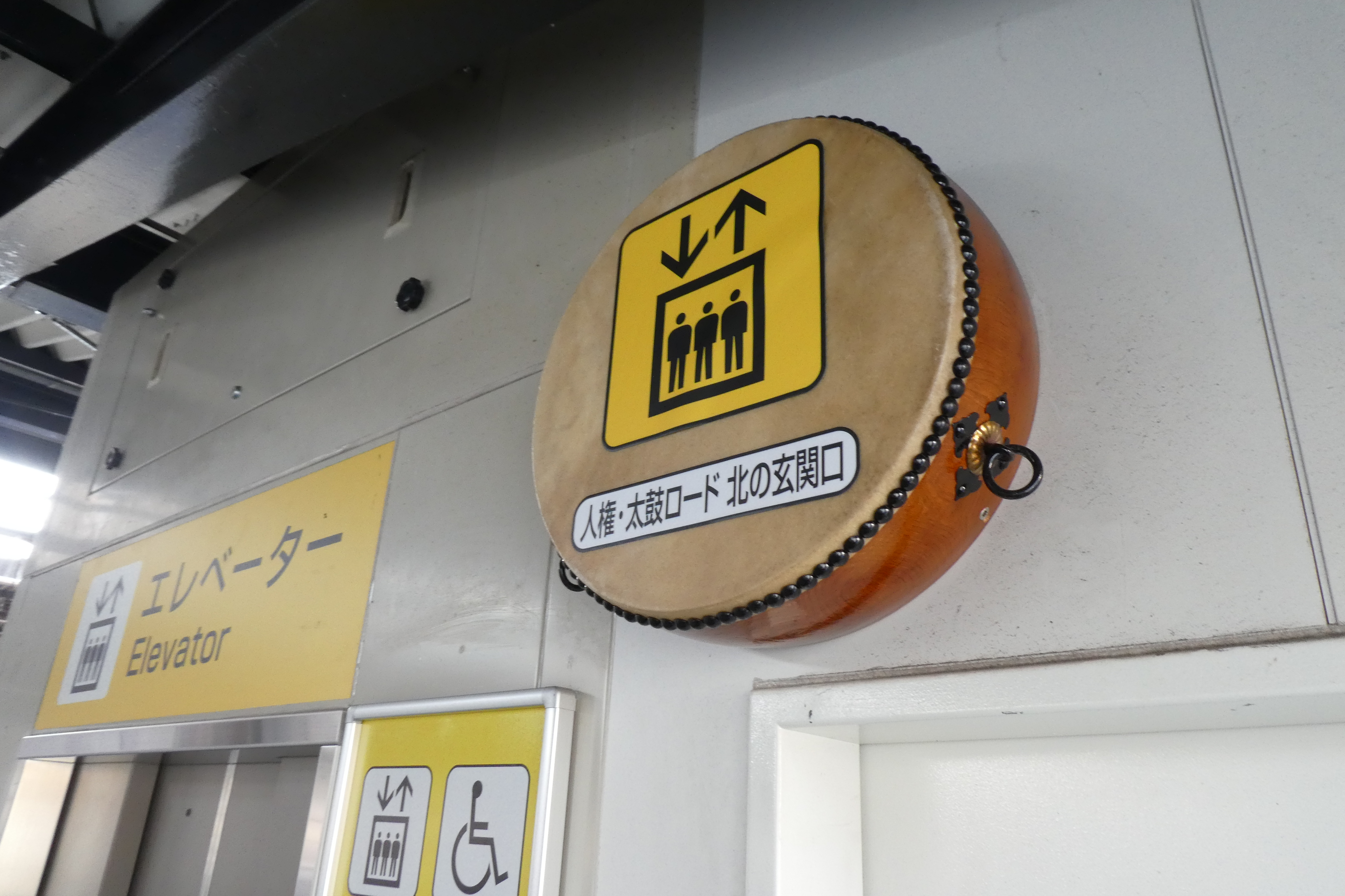 大阪環状線 芦原橋駅。和太鼓にエレベーターのピクトグラムが貼り付けられてる。